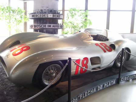 auto Mercedes Benz W196 flecha de plata, de Juan Manuel Fangio